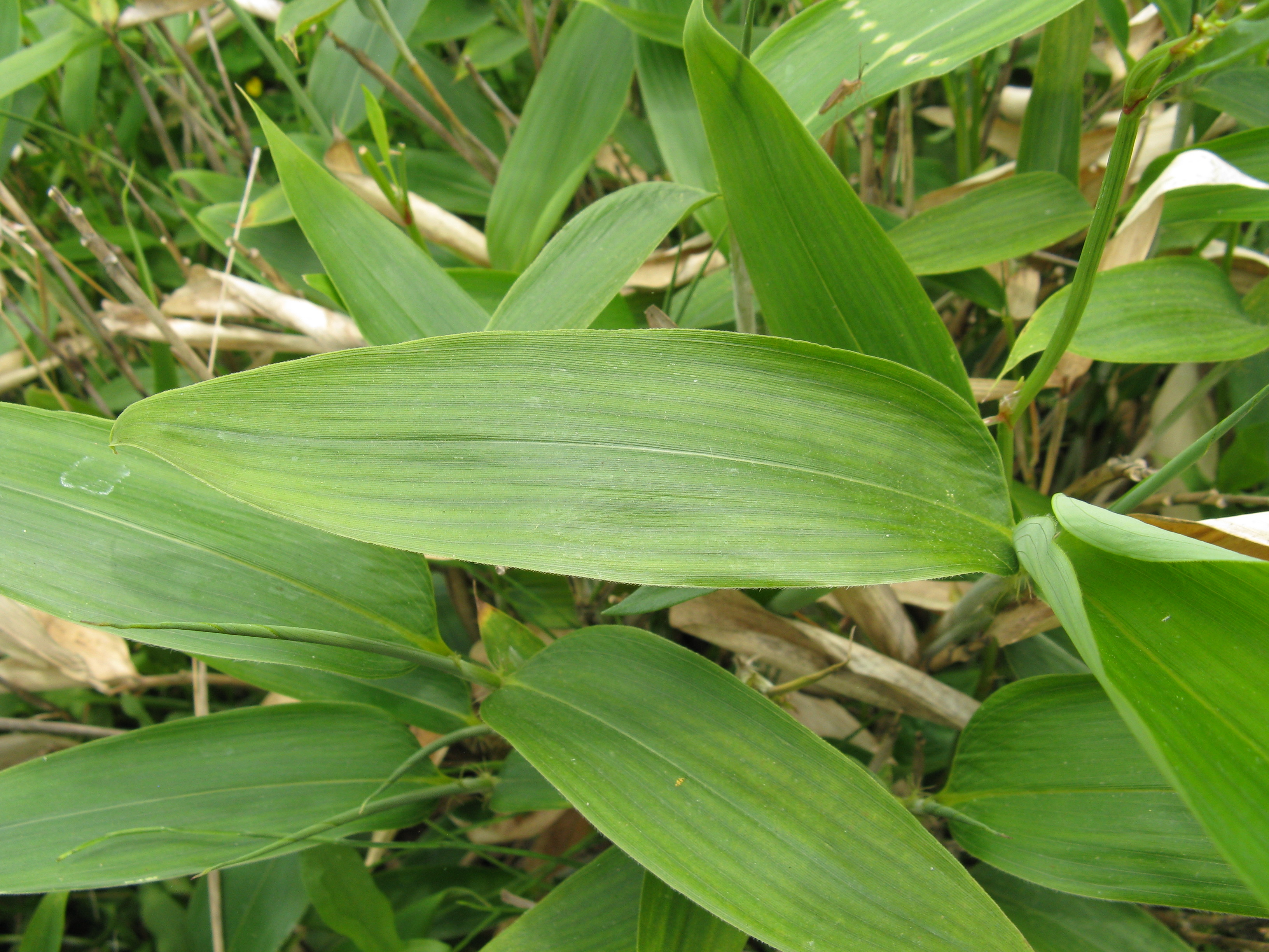 Scientific name Sasa veitchii